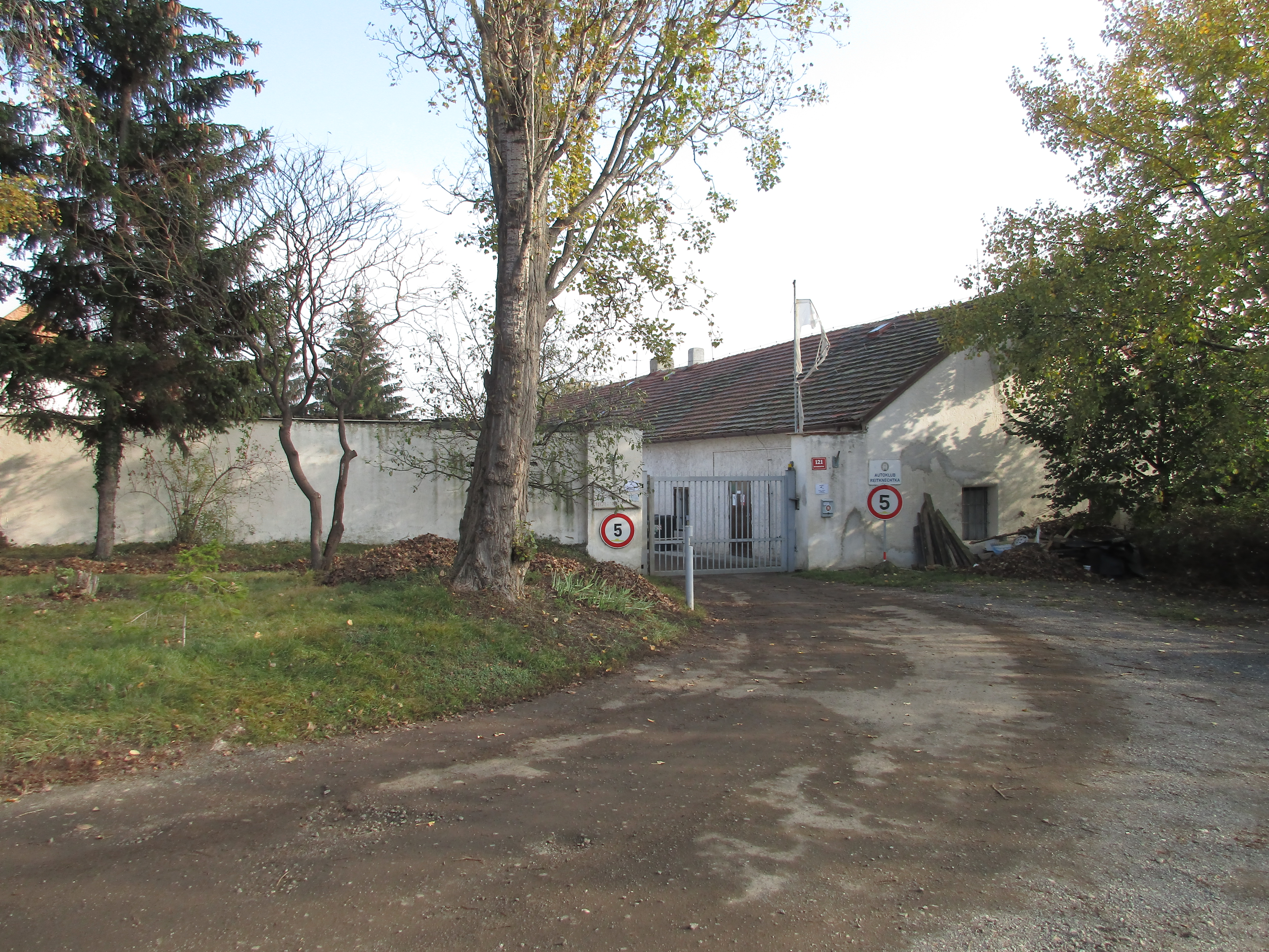 Reitknechtka.